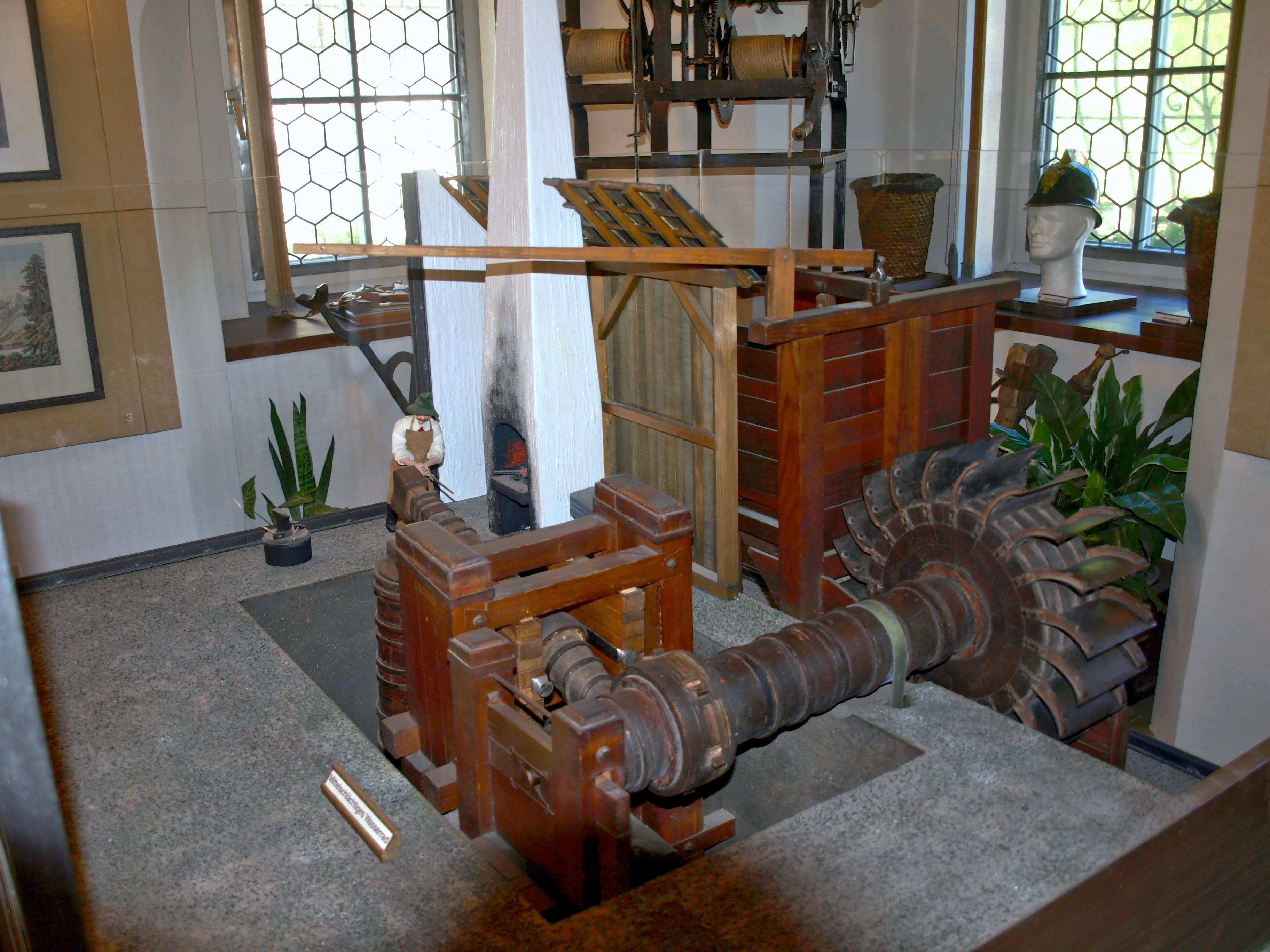 Museum, (Kino, Fahrerhof, Hauptgebäude, Stöckl)